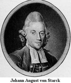 Kupferstich vermutlich aus Werkausgabe